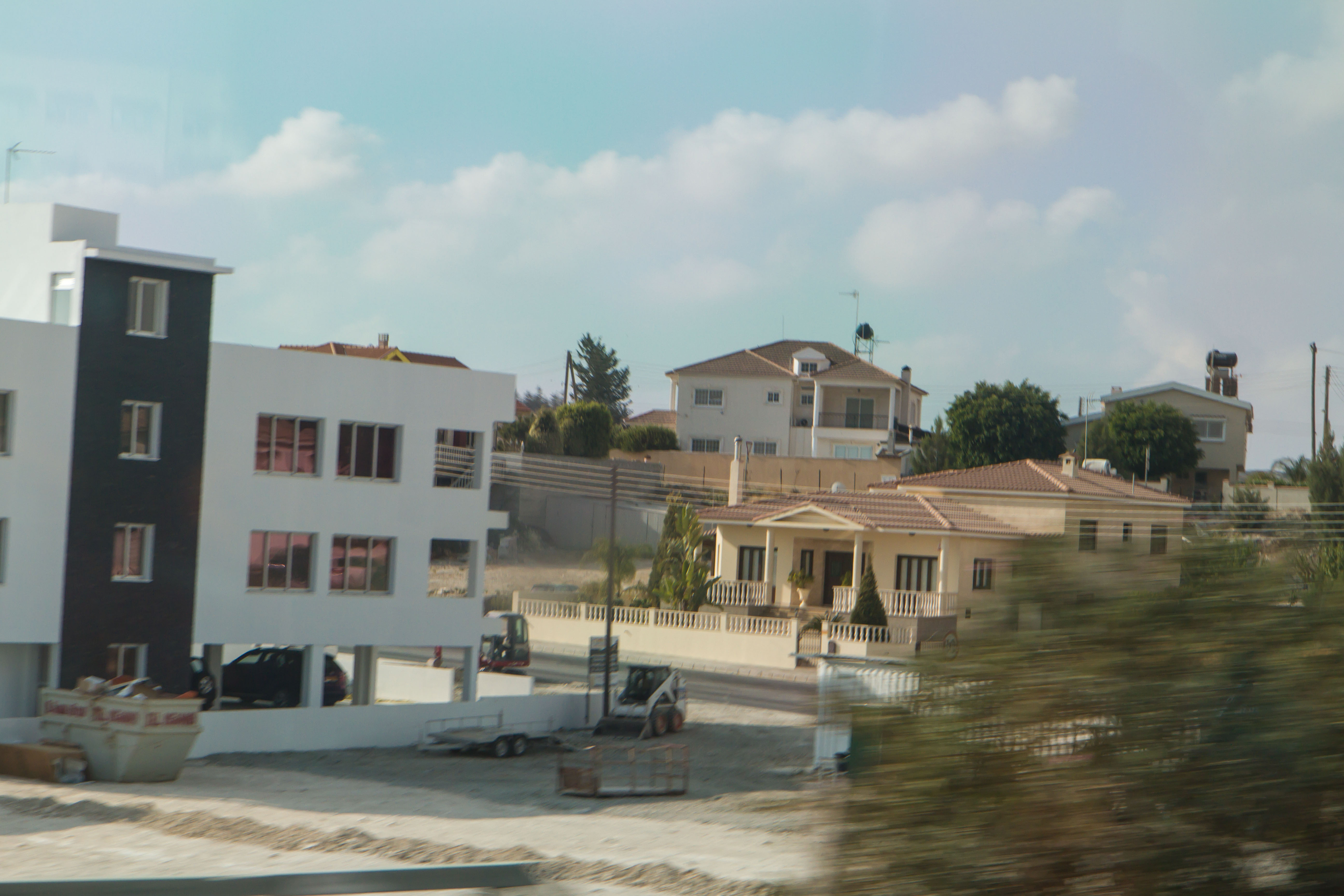 Aradippou, Cyprus